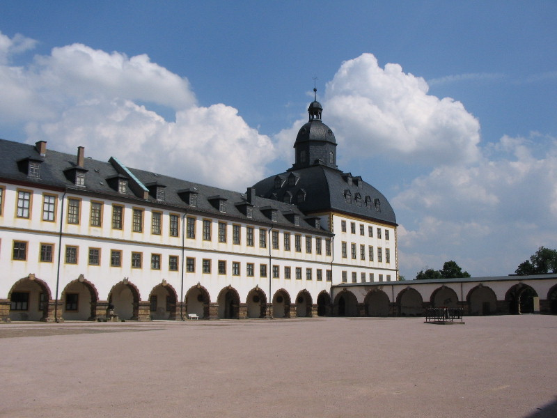 Autor: Selbst fotografiert Kamera: Canon Powershot A85)